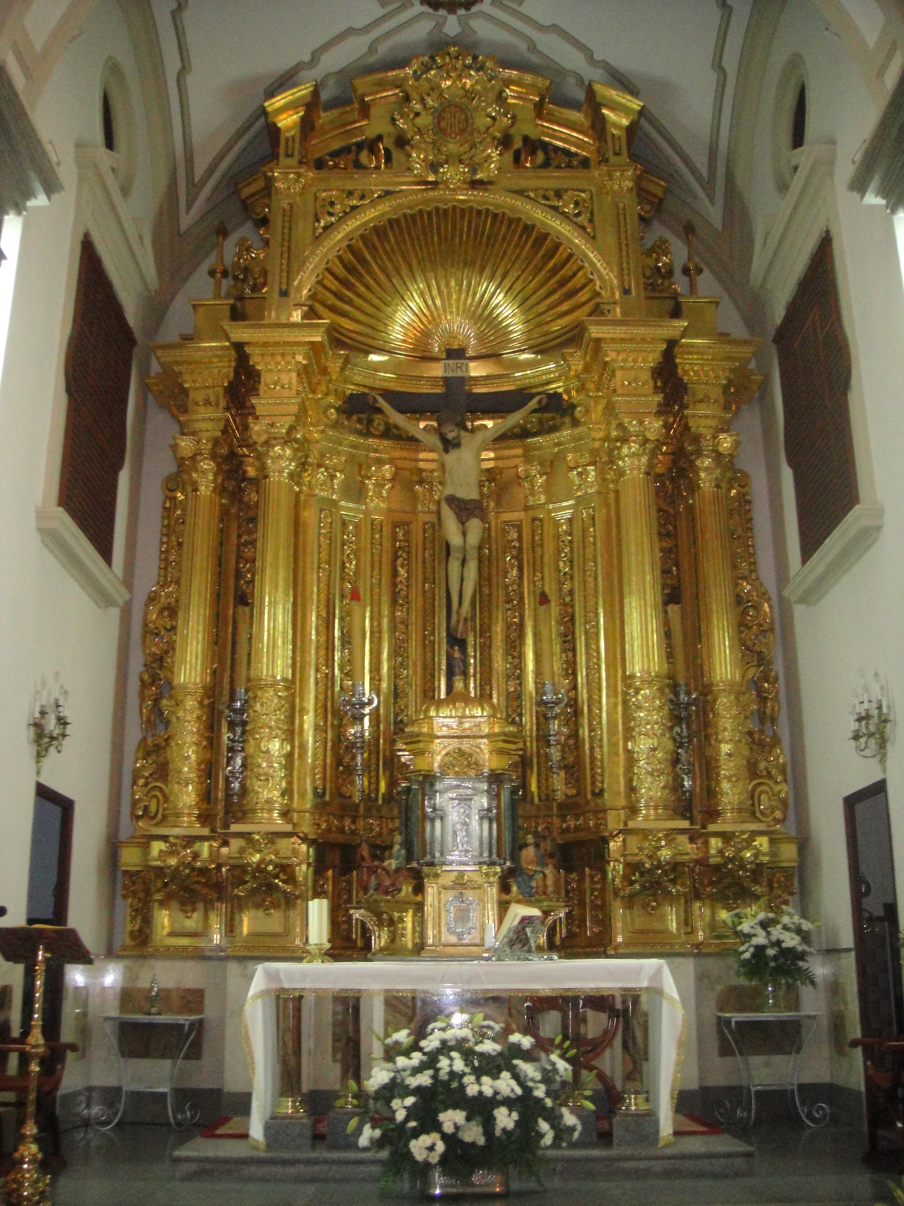 Retablo mayor de la iglesia del Dulce Nombre de Jesús de Villanueva de Córdoba, provincia de Córdoba, (España).